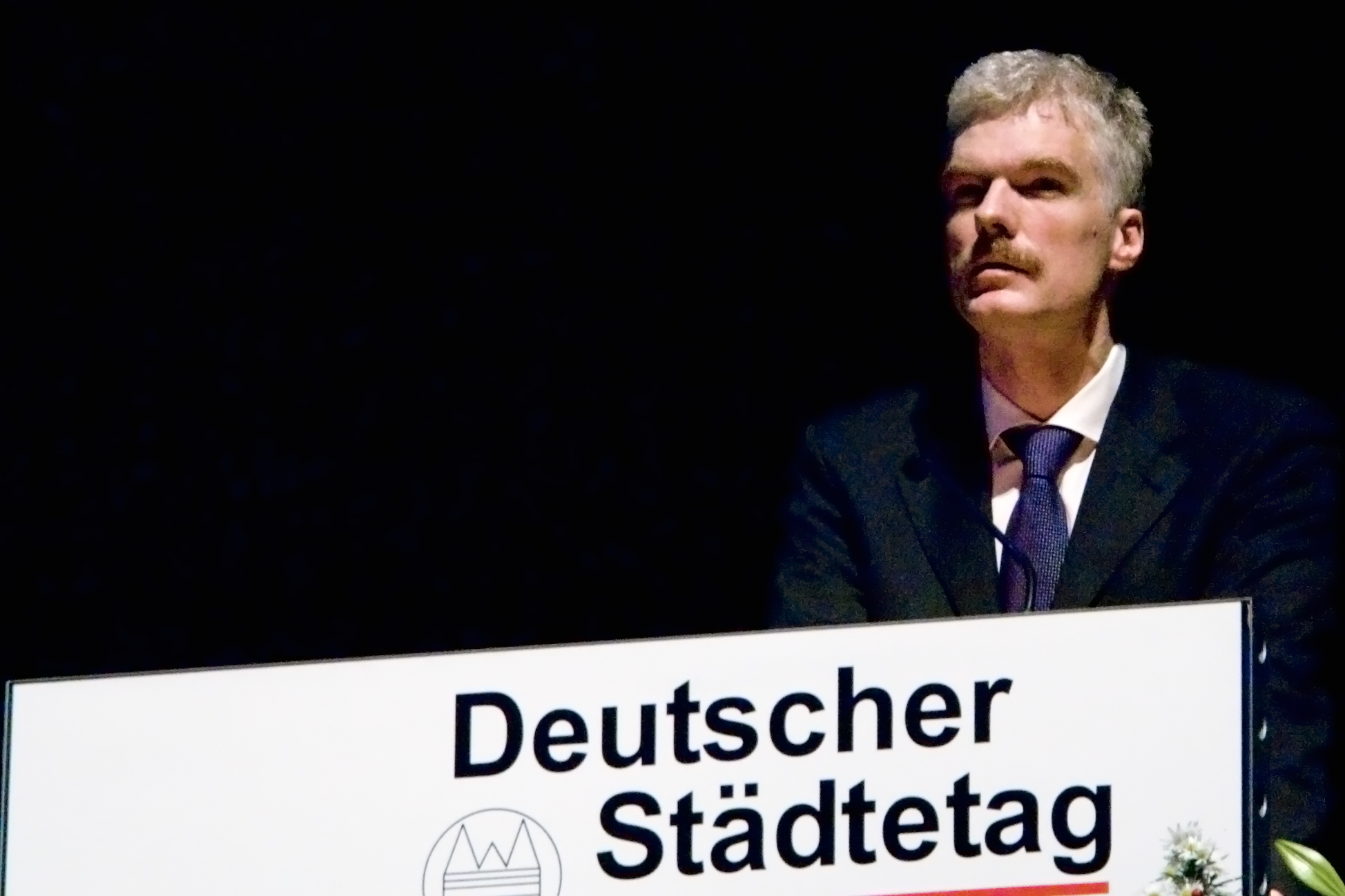 Andreas Schleicher (german scientist)